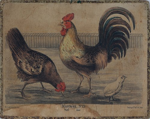 Schoolplaat: Dierenrijk. No. 19. Vogels Hoenderen. Kleurenplaat met kuiken, kip en haan. Materiaal: papier, karton techniek: kleurendruk afmetingen: 61,8 cm x 49,2 cm